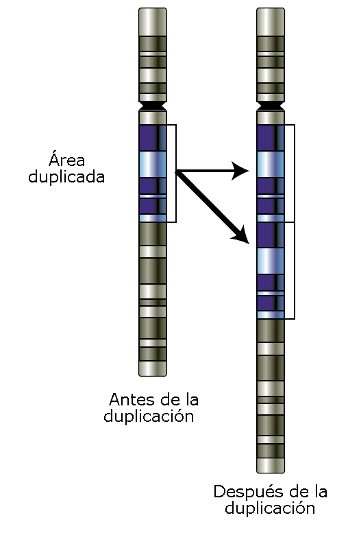 Esquema de un cromosoma en el que se muestra el fenómeno de la duplicación de un fragmento de material genético.